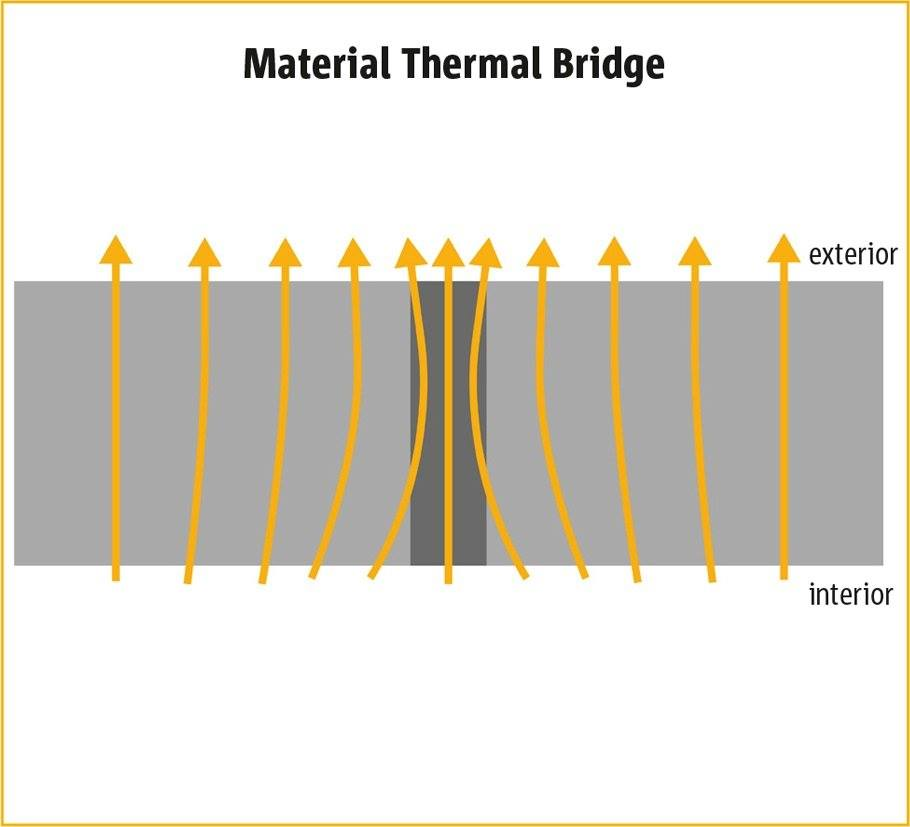 Joonis 2